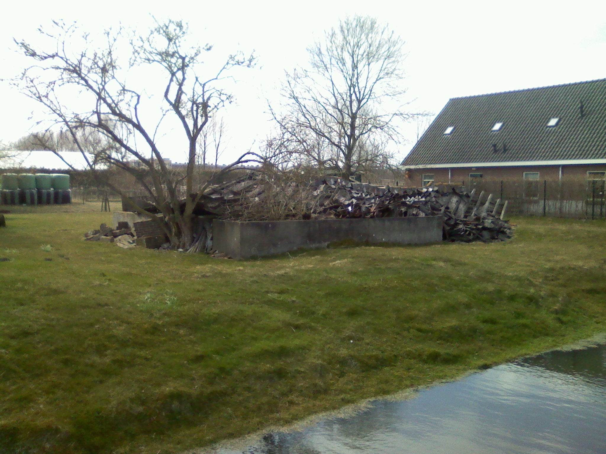 Voormalige veestal behorende bij boerderij Buitenrust. Veestal is in januari 2007 ingestort en nog niet van de lijst verwijderd.